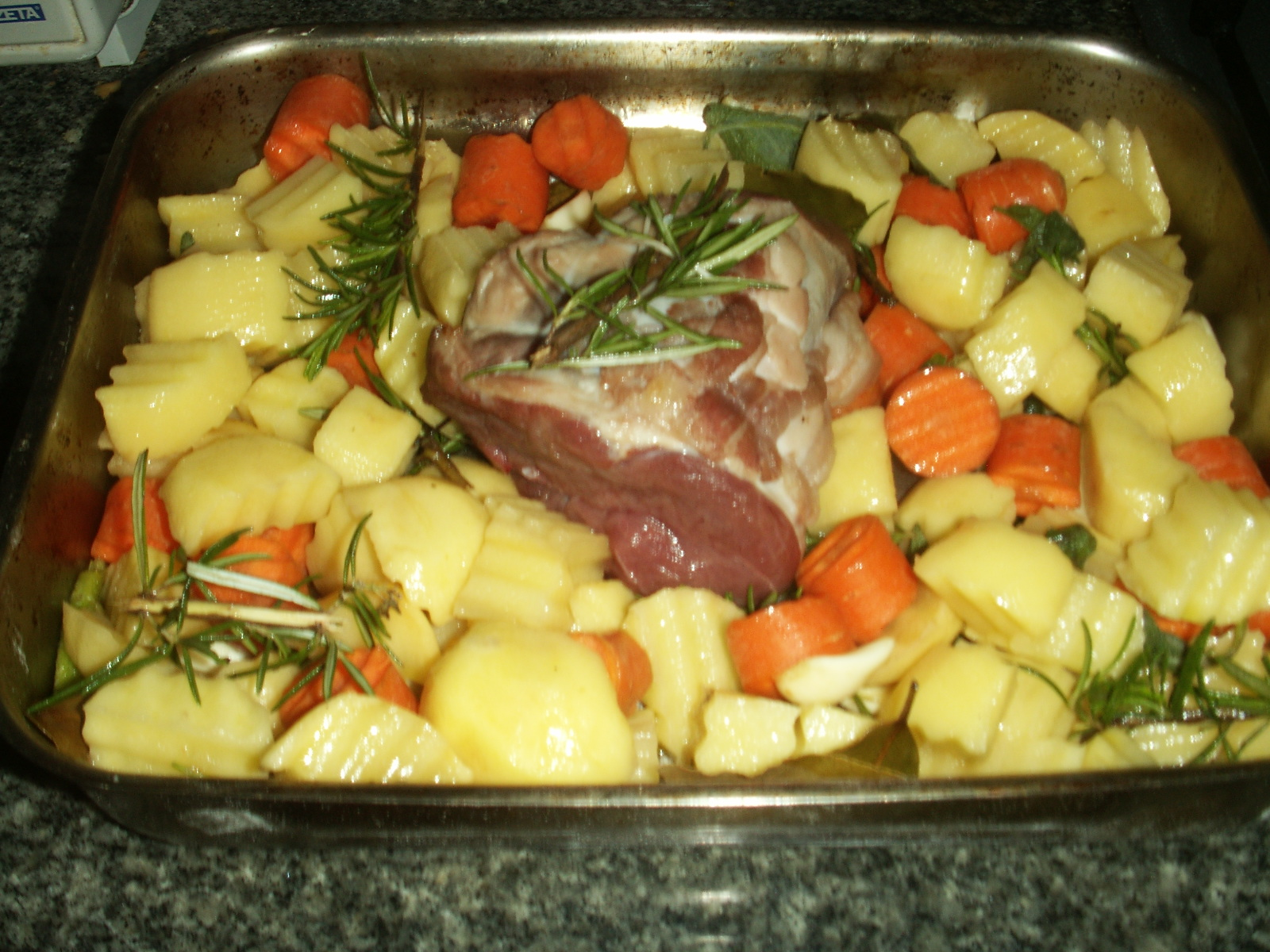 Coscia d'agnello cruda disossata con pancetta, patate e carote